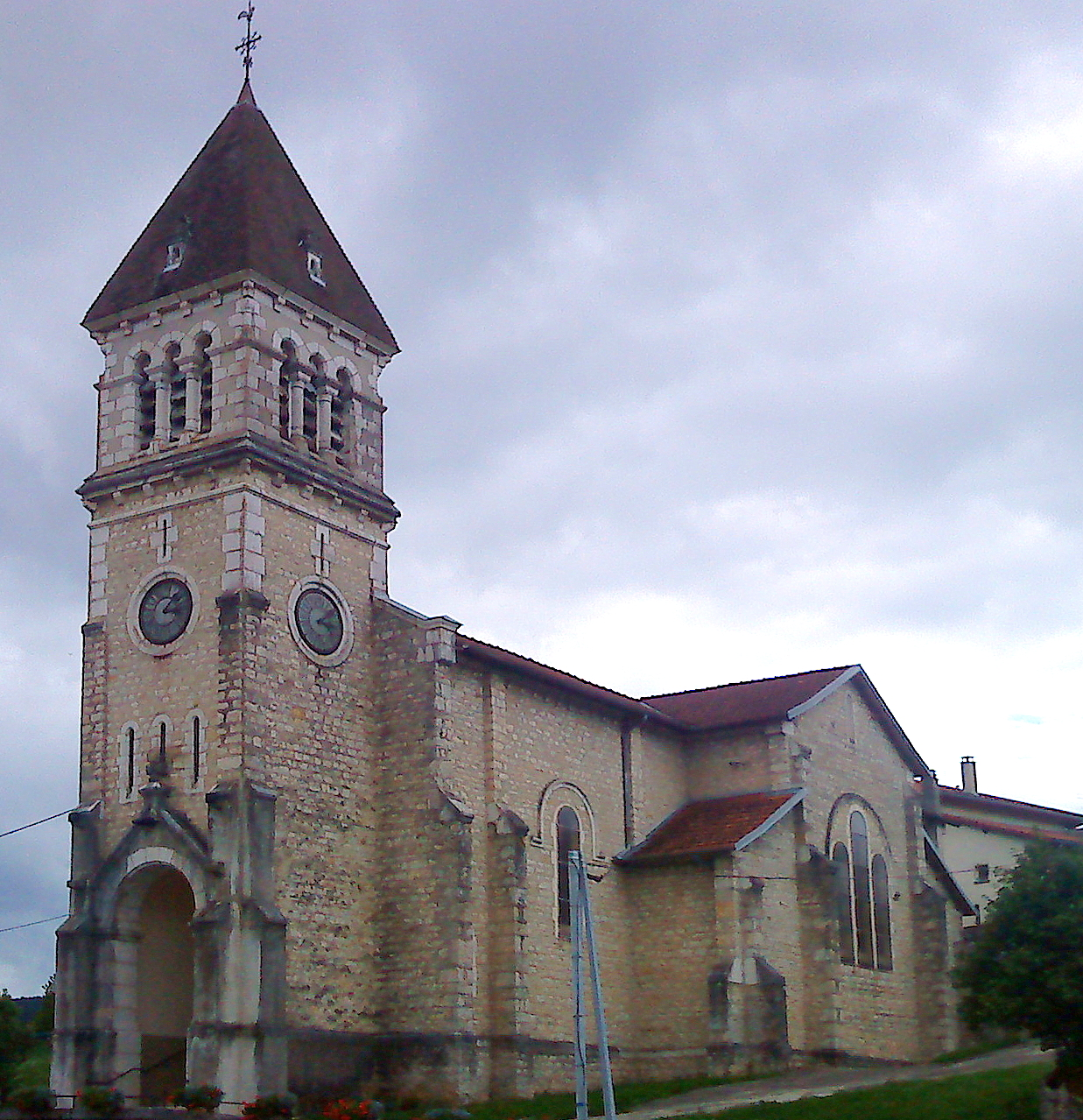 L'église de la commune de Maillat (Ain, France)